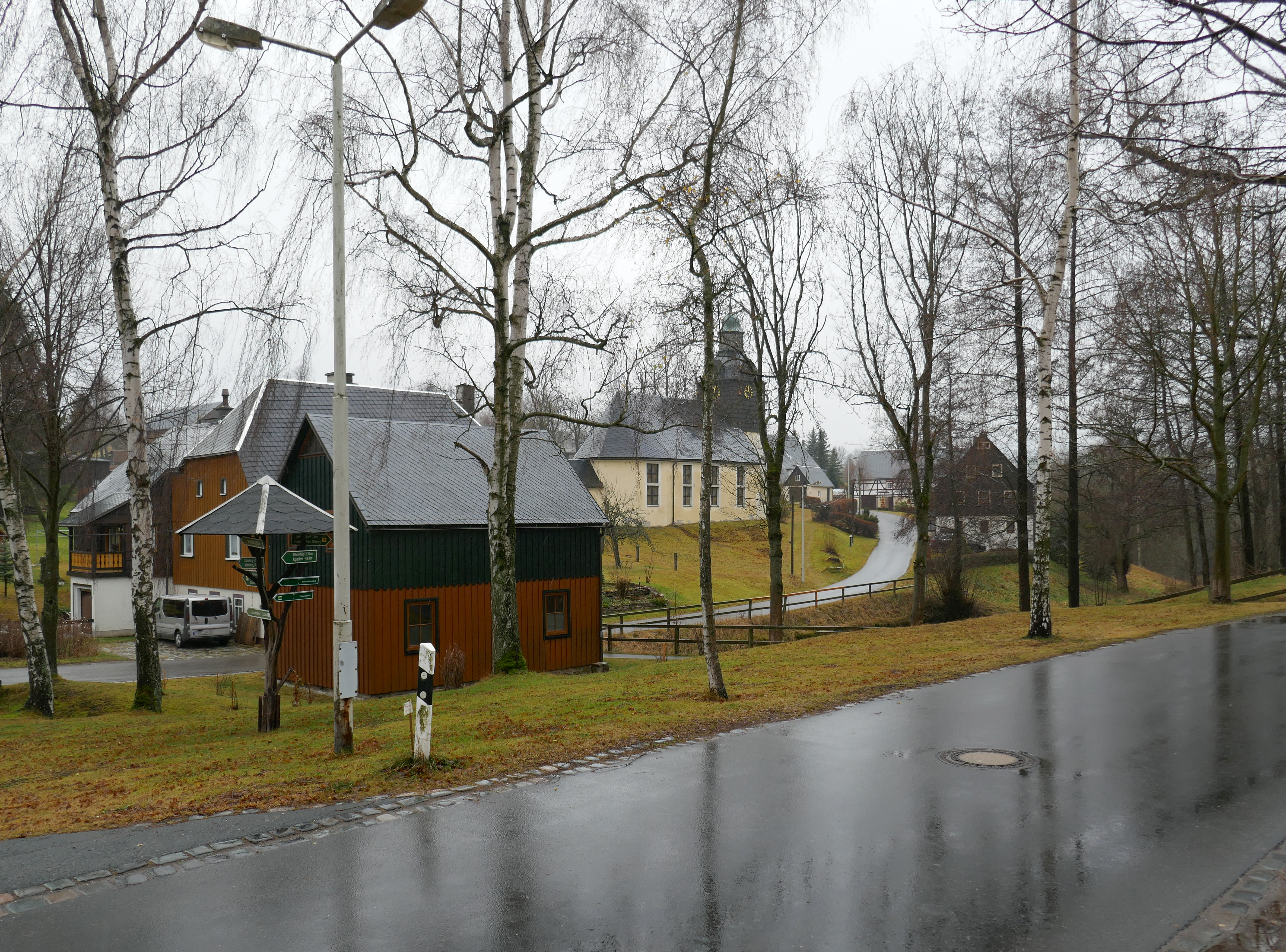 Hauptstraße Schönfeld (Dippoldiswalde) (mit Blick zur Dorfkirche), Landkreis Sächsische Schweiz-Osterzgebirge - Sachsen.